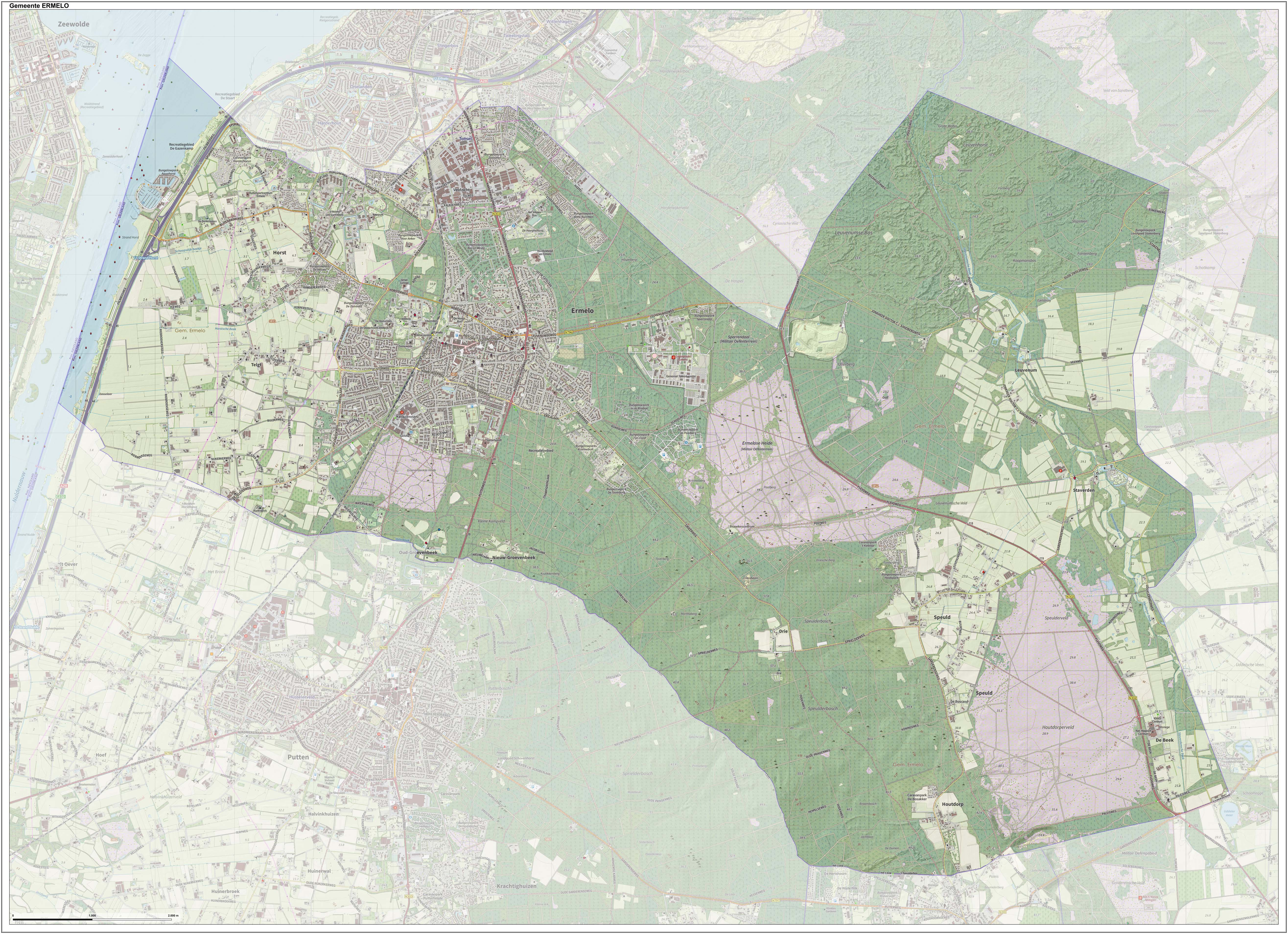 Topografische gemeentekaart. Resolutie: 400 pixels/km. Kaartbeeld samengesteld uit de open geodata van de Top10NL en Top25namen (Kadaster), Creative Commons-BY licentie. Gebouwvlakken uit open geodata BAG extract. Wegen uit de OpenStreetMap, OpenStreetMap community. Reliëfschaduw uit de Actuele Hoogtekaart AHN2. Samenstelling en kleurenschema: Jan-Willem van Aalst, met QGIS. Zie ook de Legenda.